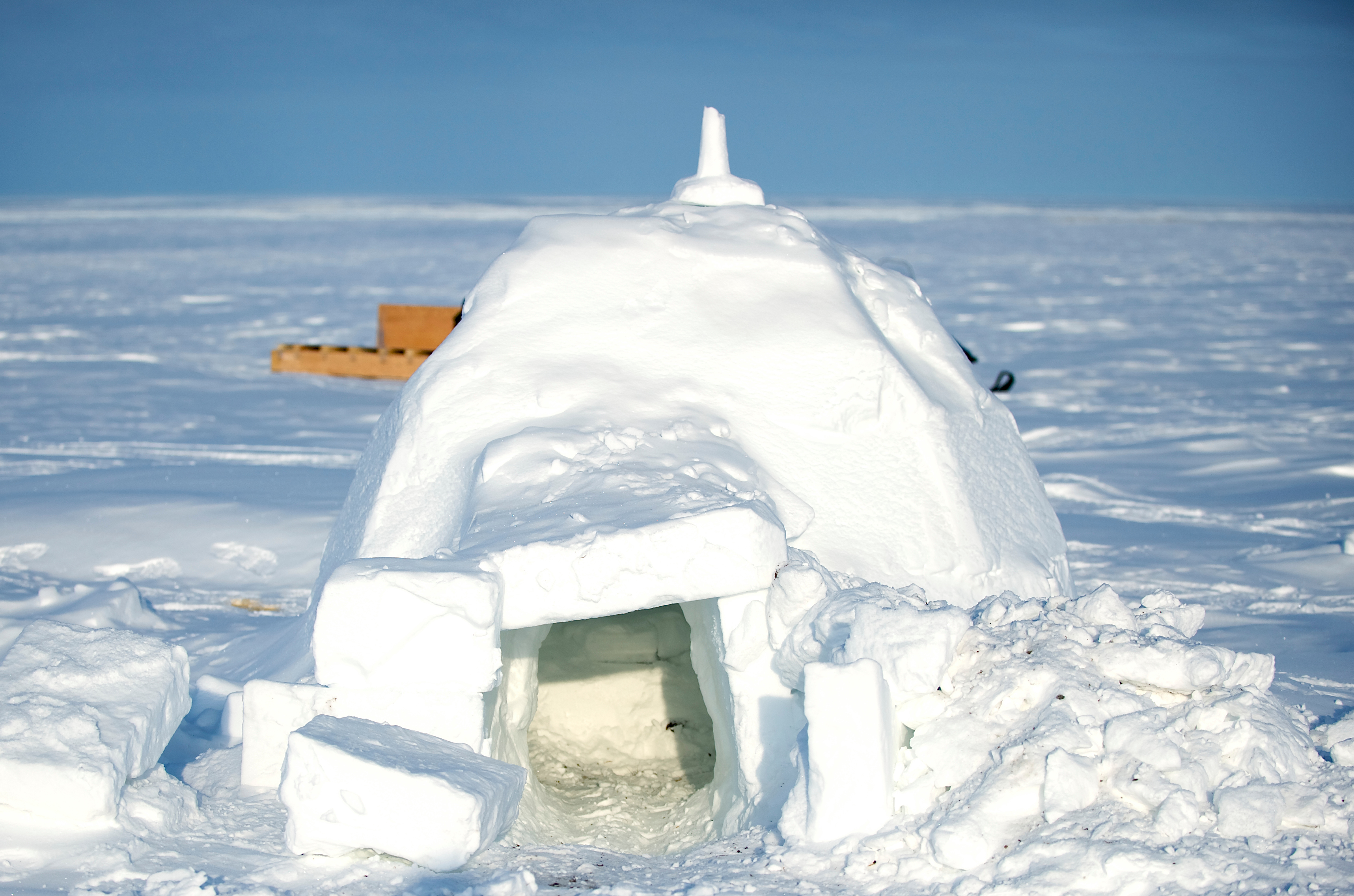 Igloo in Alert, Nunavut